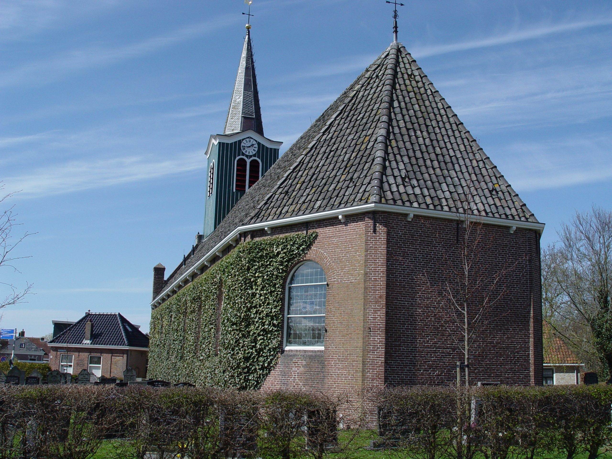 Ankertsjerke Oudega